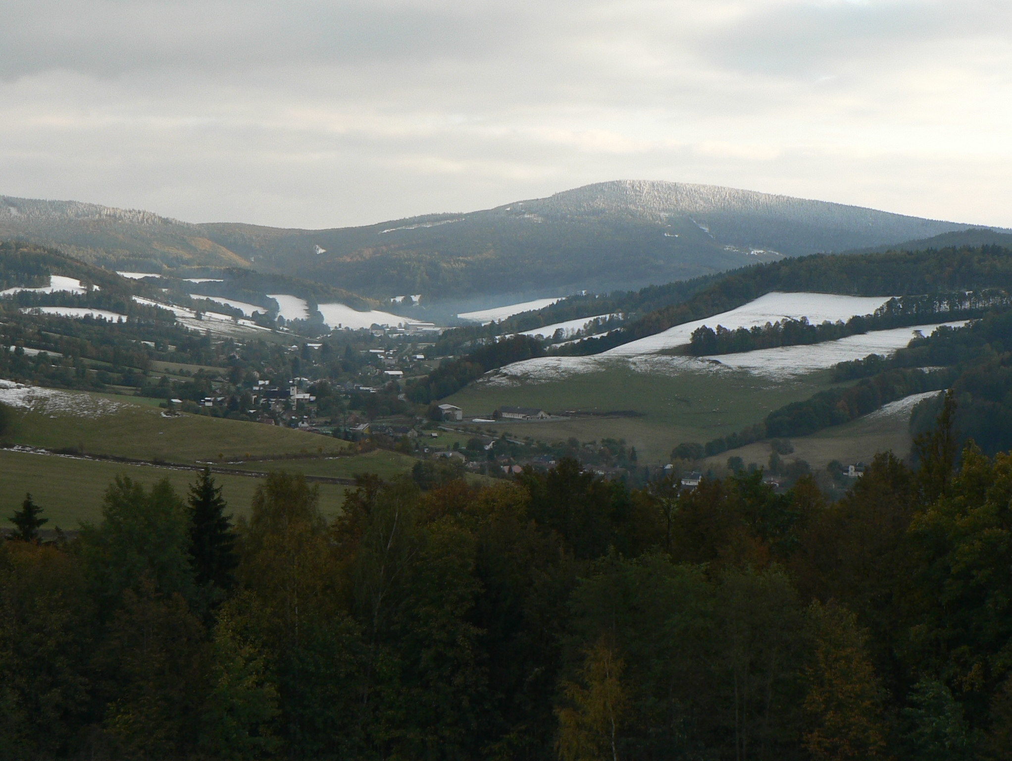 Česky: Kamenný vrch nad Sobotínem.